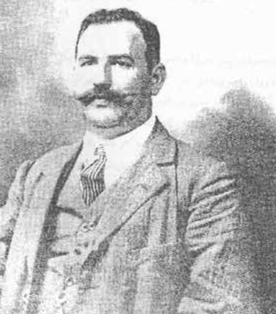 احمد محمودی (کمال‌الوزاره) از پیشگامان نمایشنامه نویسی ایران